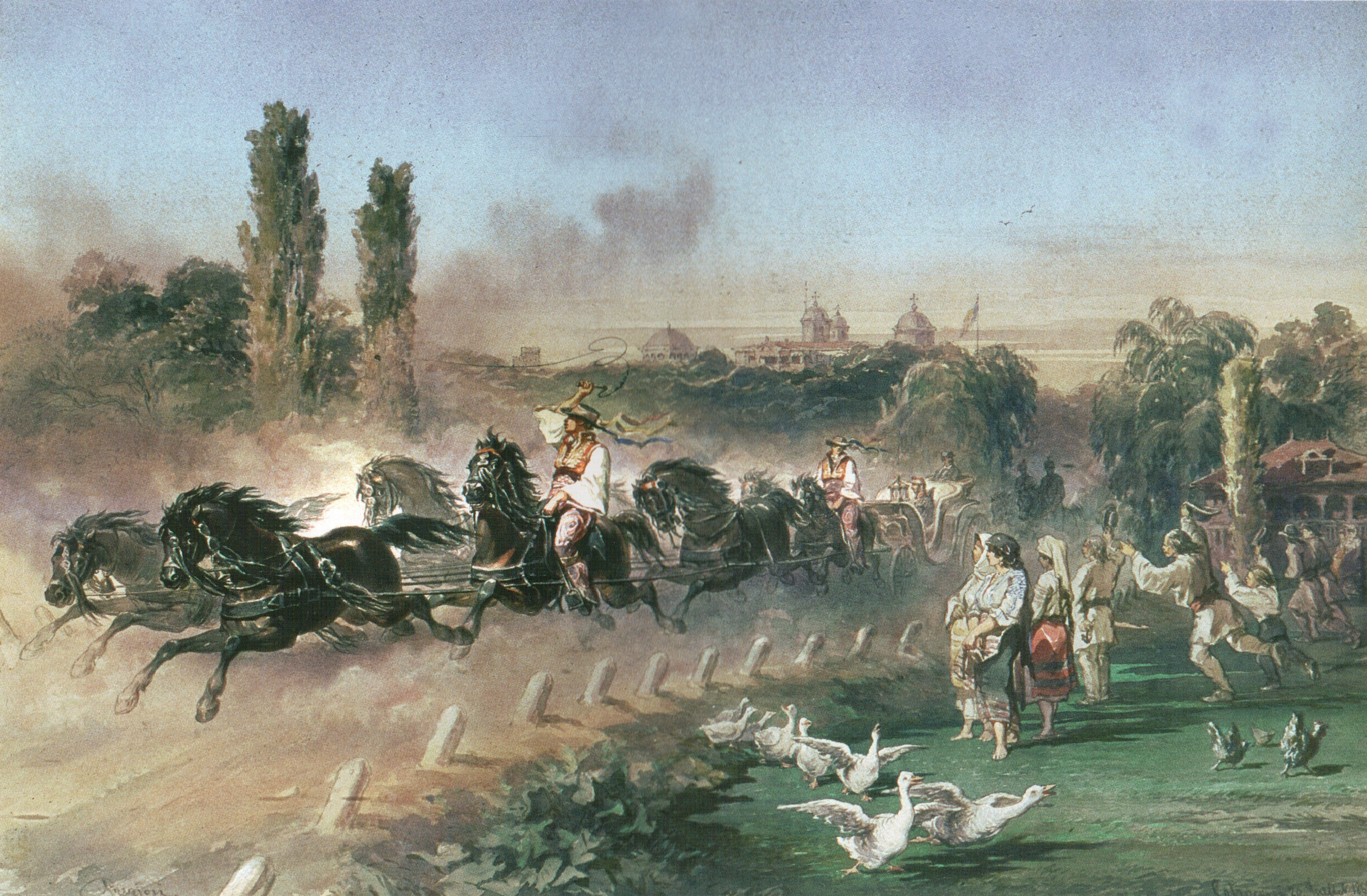 Cotroceni, Poștalionul Domnesc